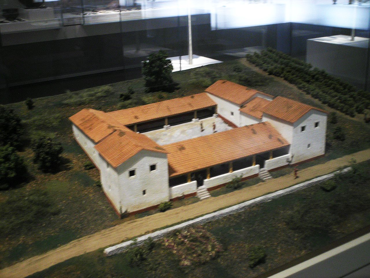 Römische Villa Rustica von Weinbergshof /Treuchtlingen, Bayern, Modell im Römisch-Germanischen Museum Köln oder Germanischen Nationalmuseum Nürnberg.